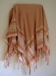 Foto de una kufiyya